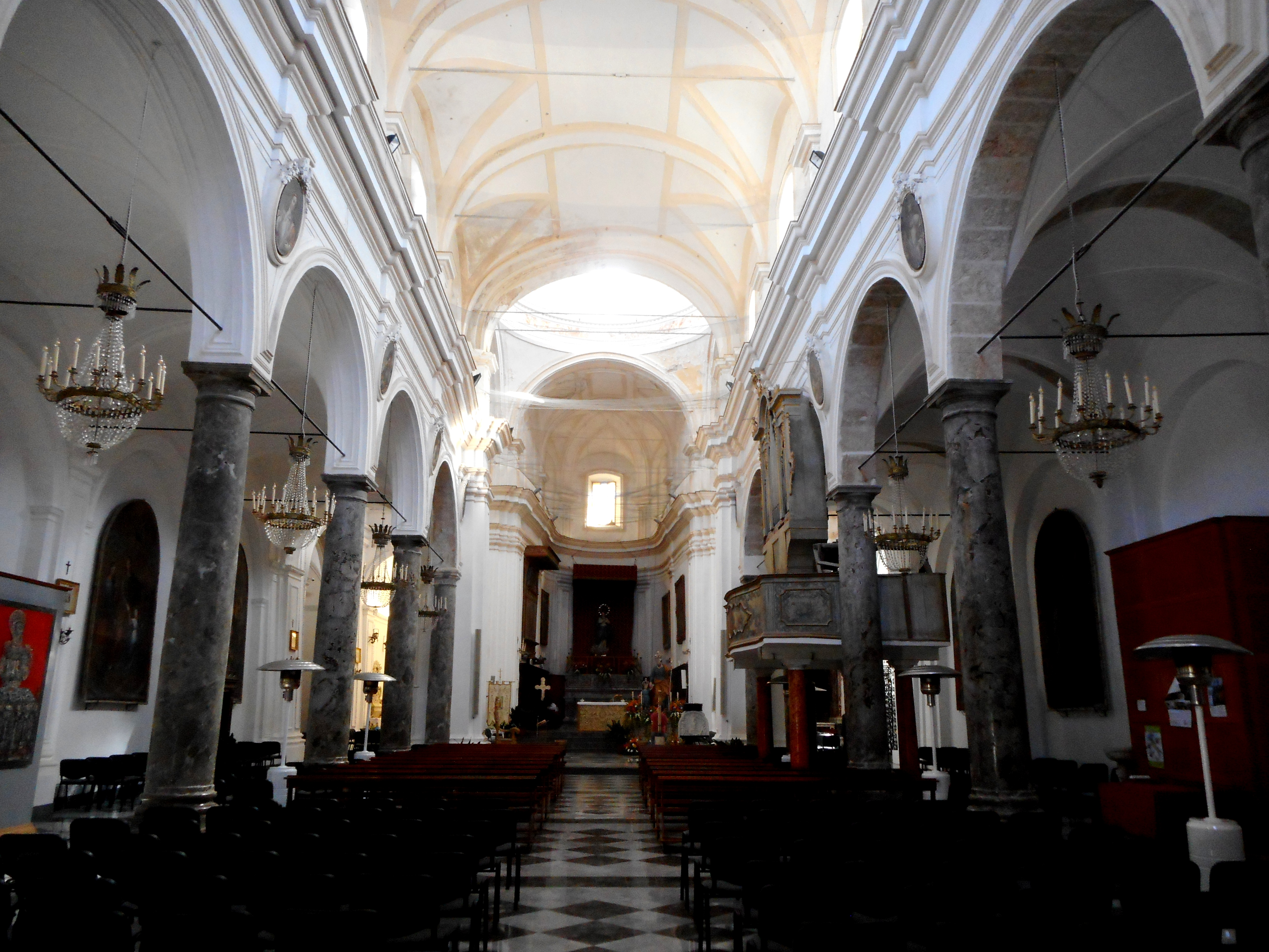 Interno della chiesa di Santa Maria Assunta a Polizzi Generosa